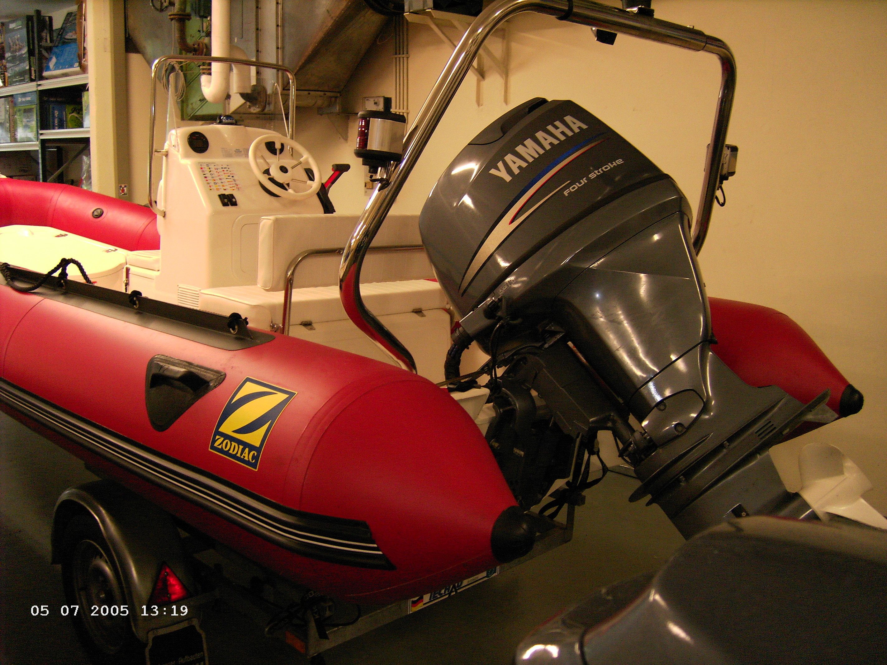 Ein Vorführboot im Schauraum meines Arbeitgebers.